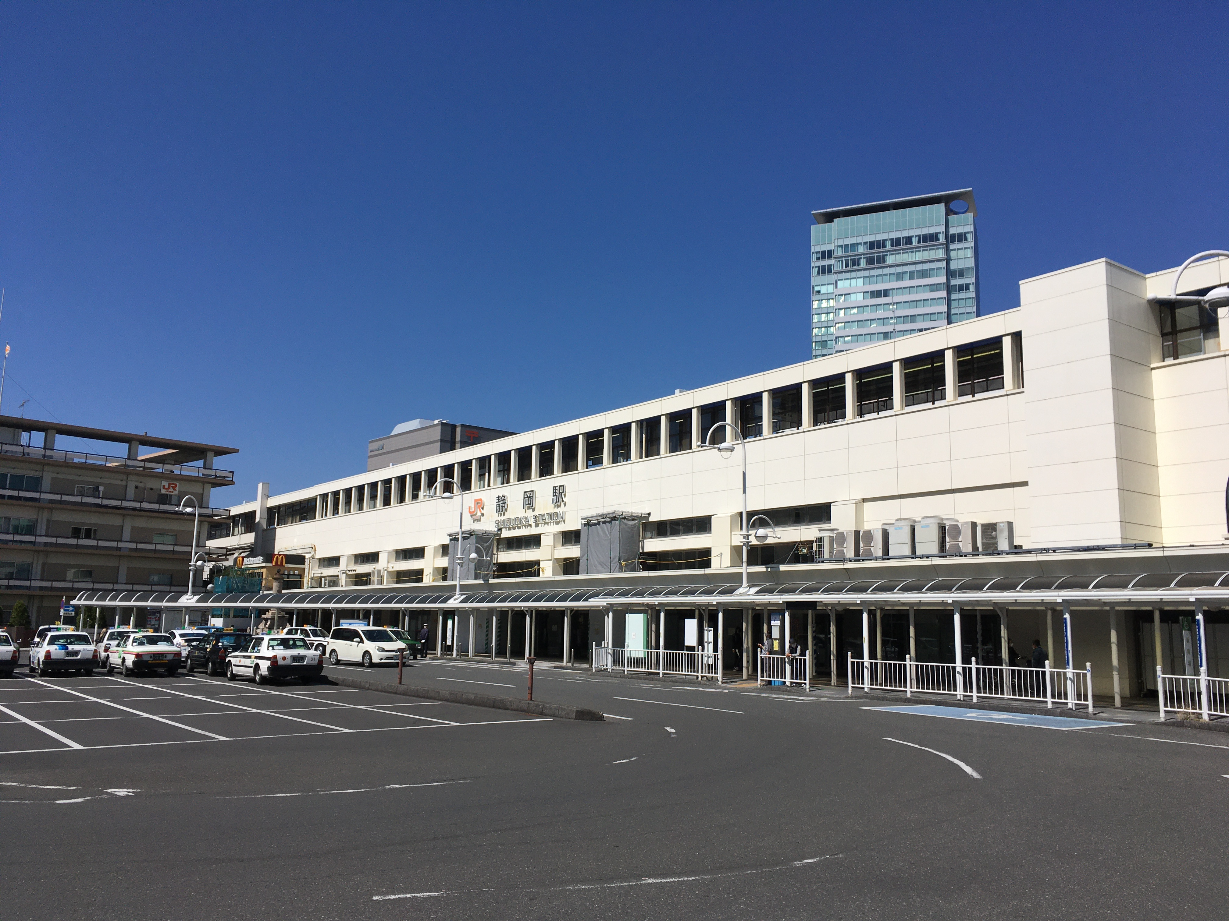 静岡駅南口